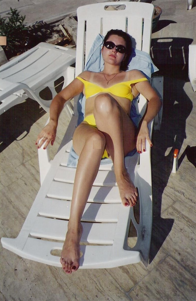 Sunbathing Russian girl in Turkey